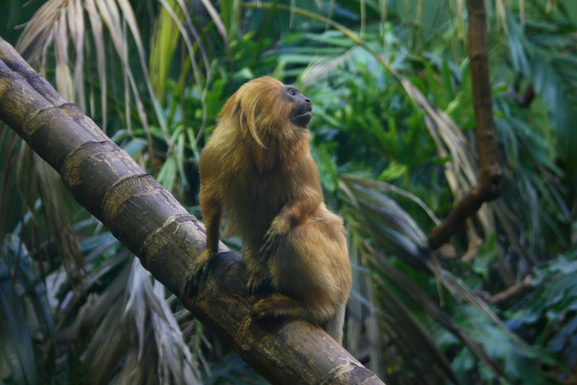 ein Goldenens Löwenäffchen im National Zoo in Washington D.C. / golden lion tamarin, erstellt unter Creative Commons mit Namensnennung (Weitergabe unter gleichen Bedinungen)